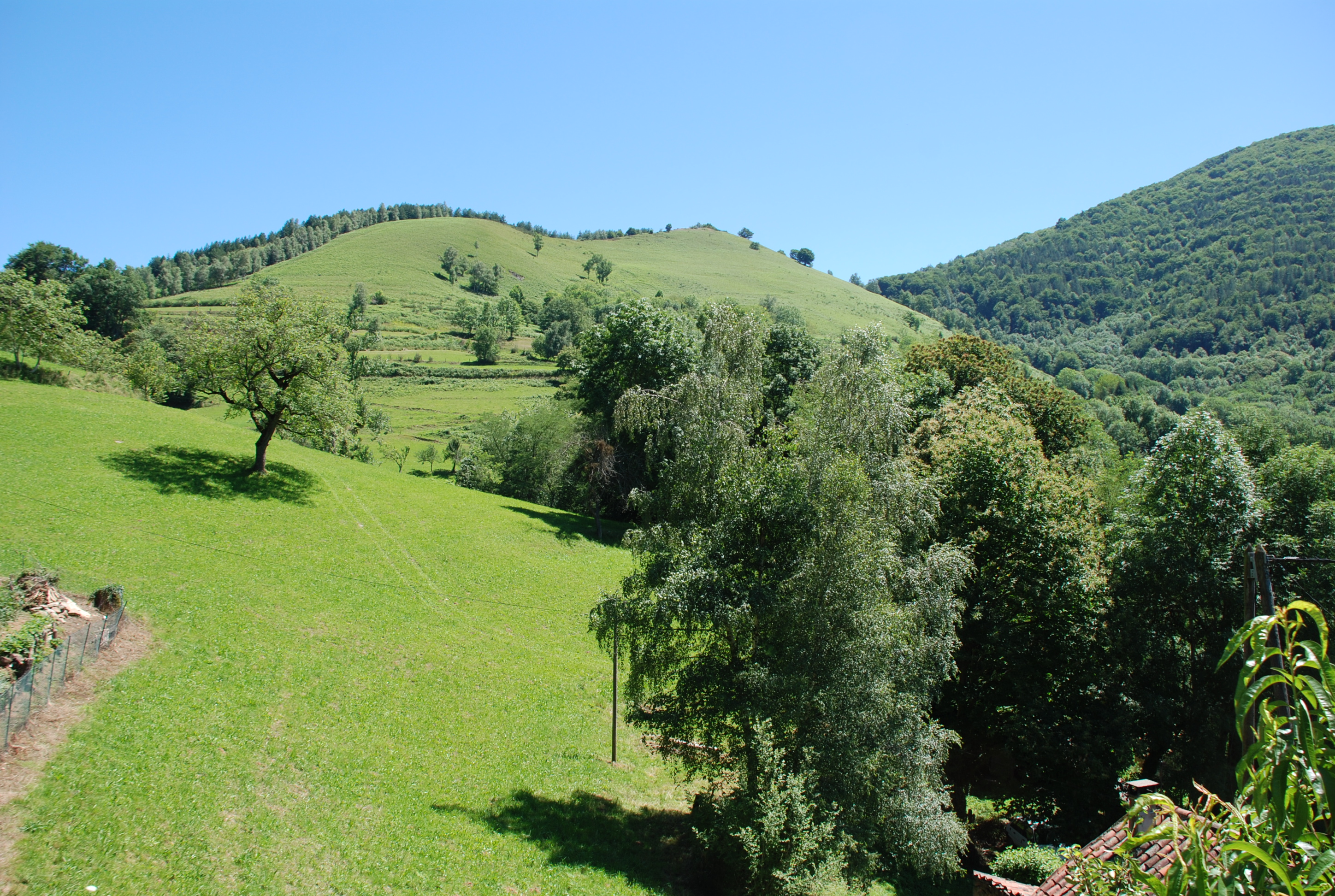 Paysage agricole et forestier depuis le Cap d'Erp, à Erp, Ariège